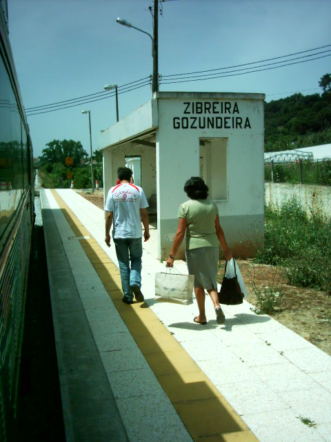 Apeadeiro ferroviário da Zibreira-Gozundeira.